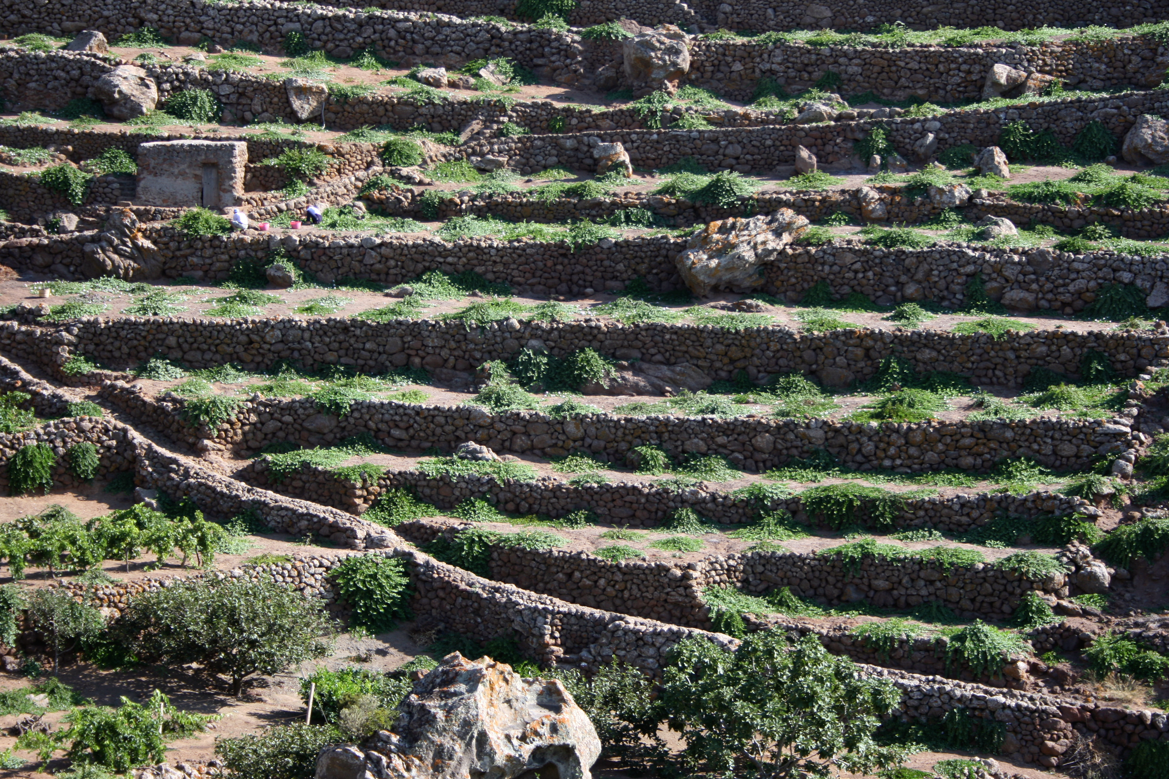 Cappereto a terrazze a Pantelleria - Italia.